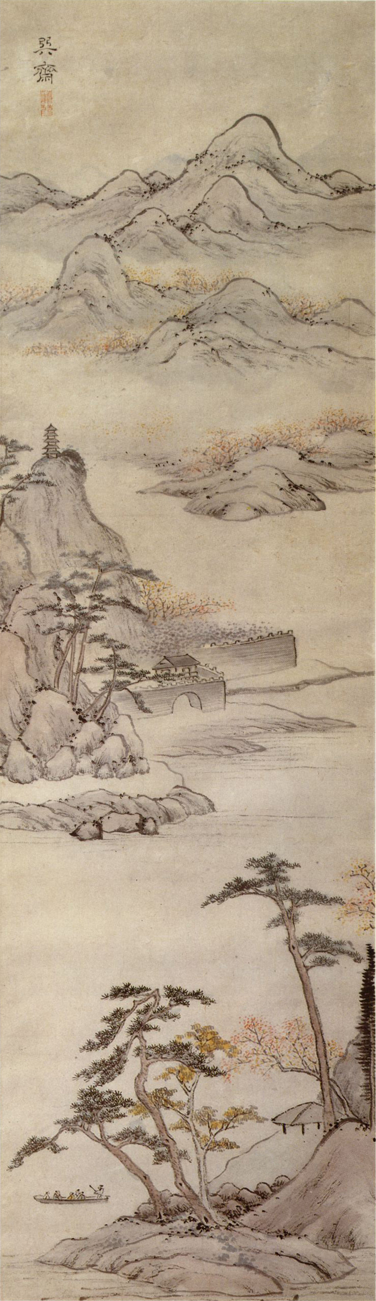 Landscape